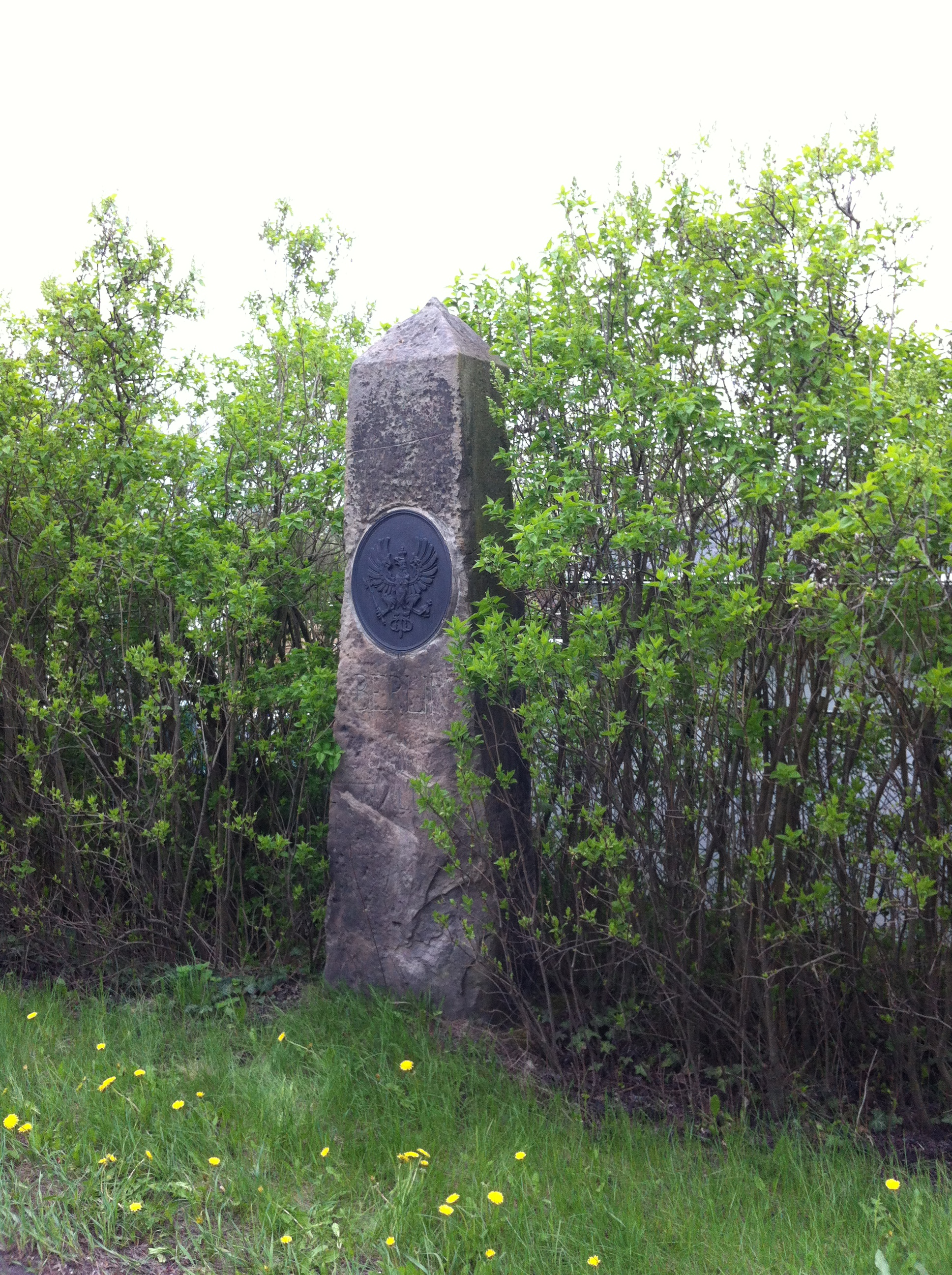 Preußischer Ganzmeilenobelisk an der B91 in Weißenfels.